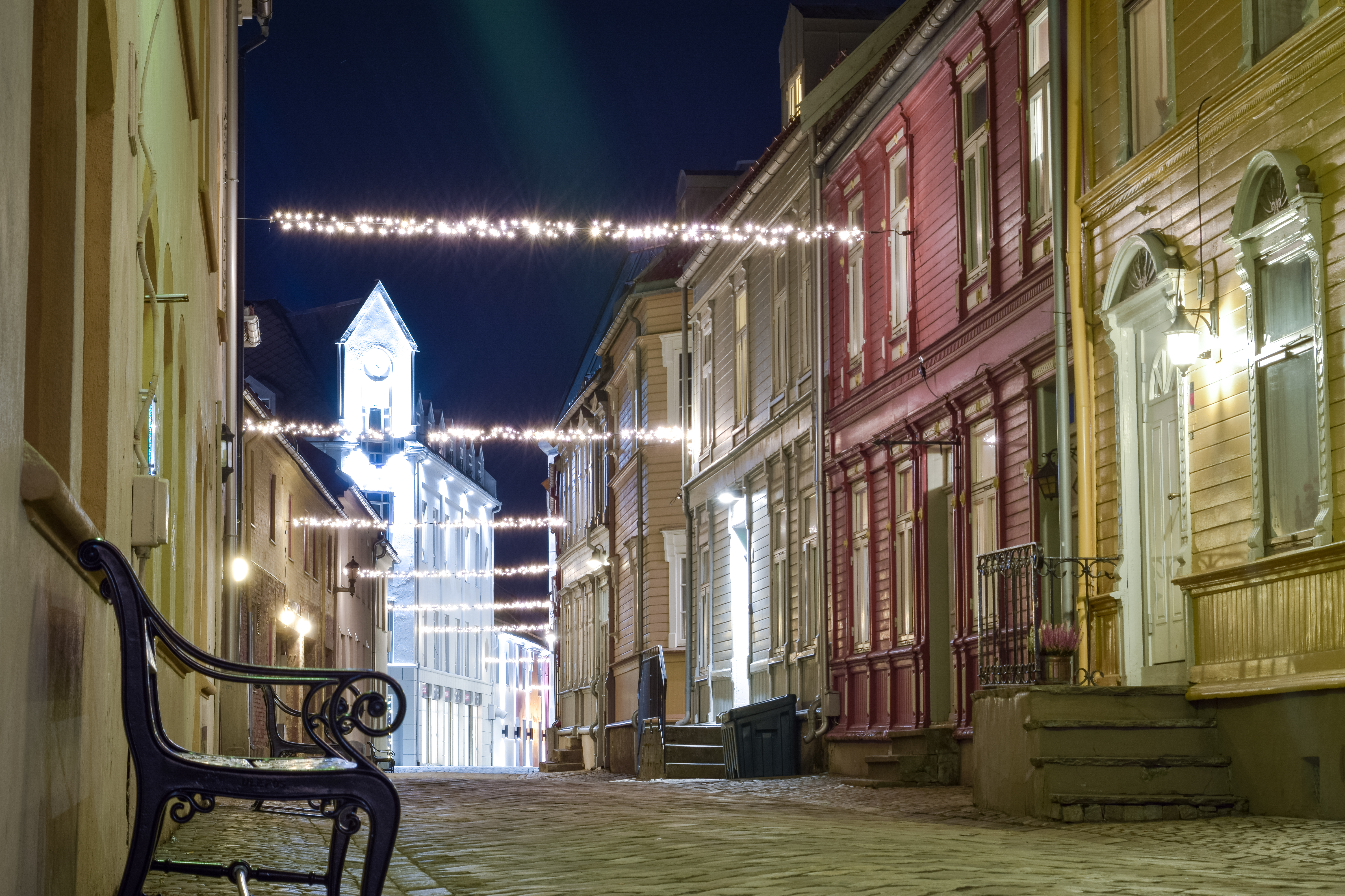 Gamle trebygg og nyere murbygg i Brattørveita, østover mot Kjøpmannsgata